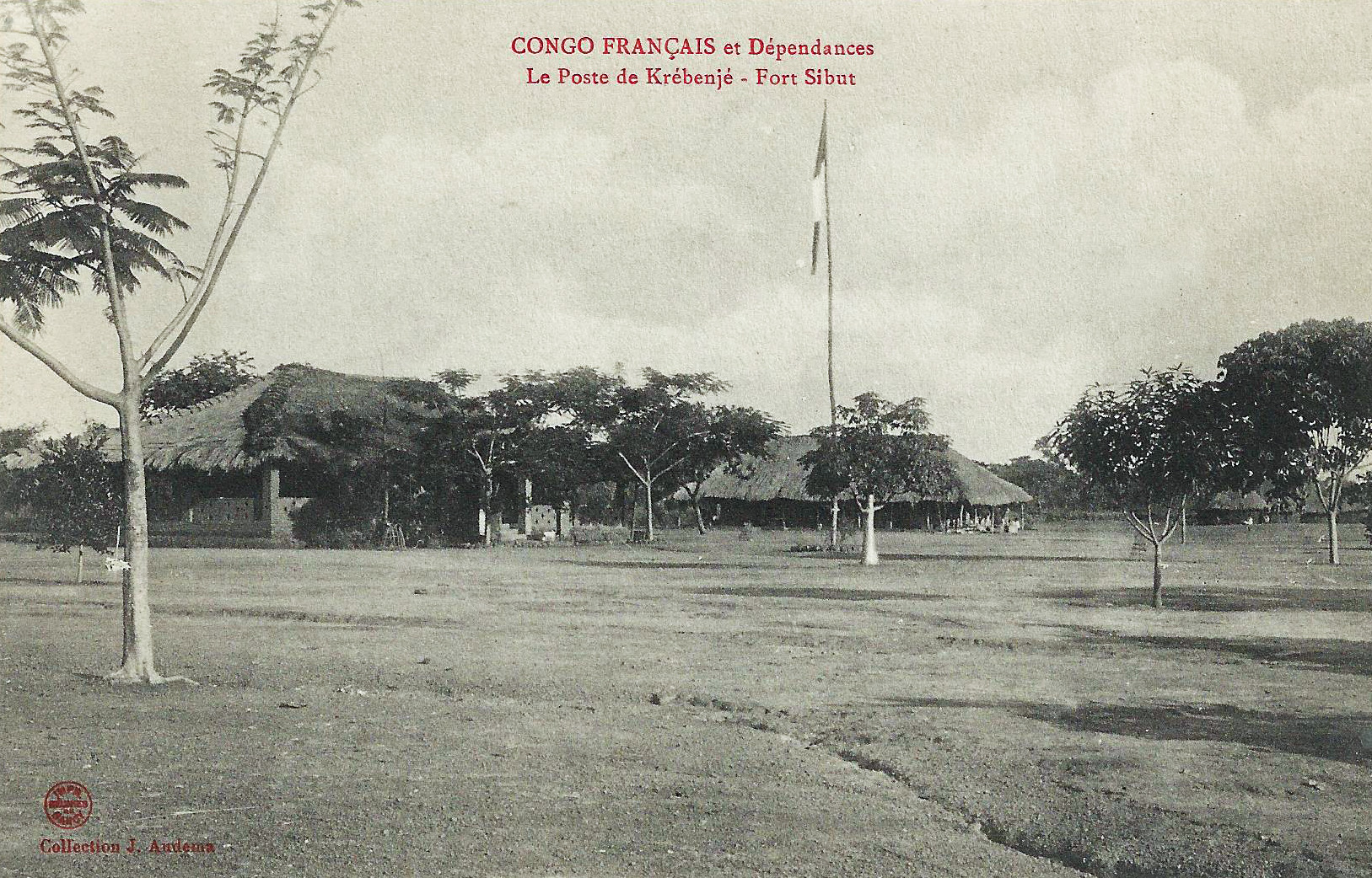 Le poste de Krébenjé. Fort Sibut. Collection J. Audema. Phot. A.B. & Cie, Nancy [Albert Bergeret] Congo Français et dépendances